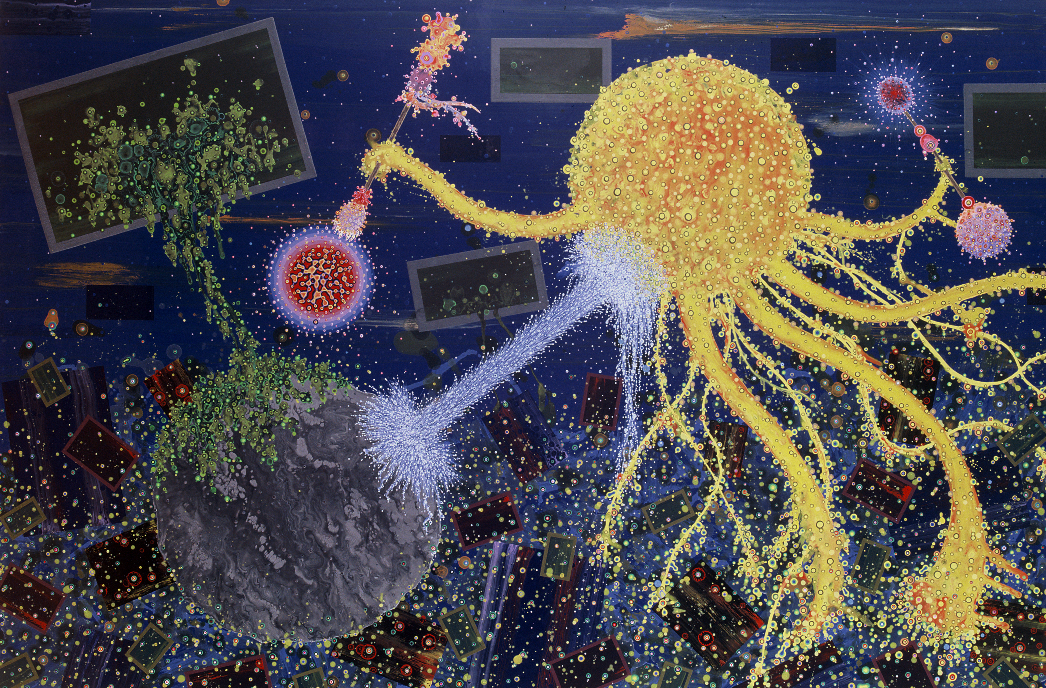 La batalla suave entre el sol y la tierra (2004), Marcelo Pombo